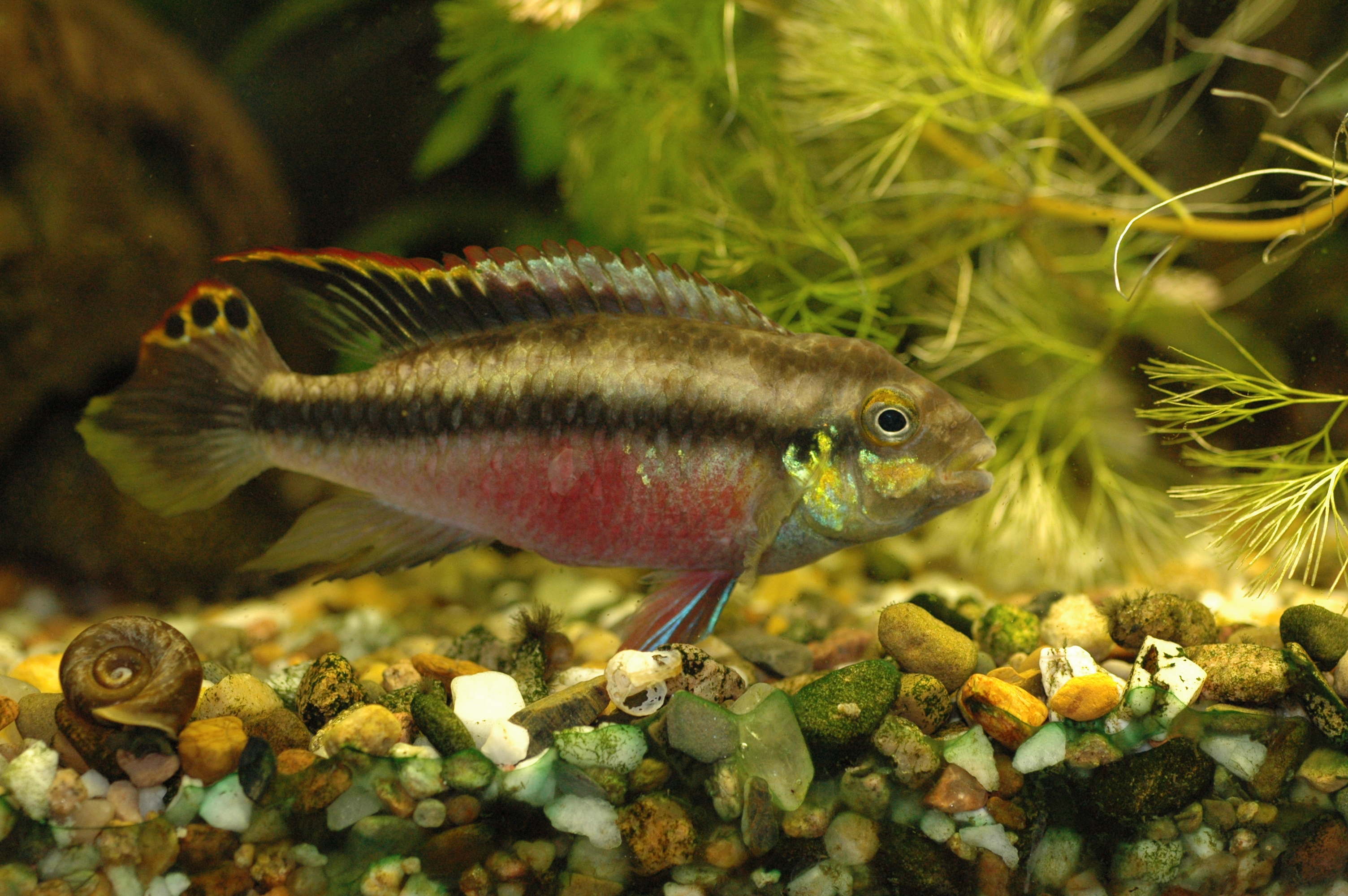 Pelvicachromis pulcher, adult male